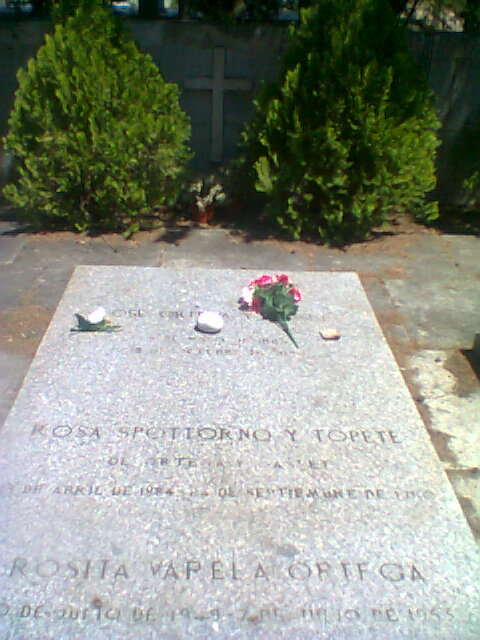 Familiengrab des spanischen Philosophen und Schriftstellers José Ortega y Gasset auf dem Cementiero San Isidro, Madrid, Spanien.